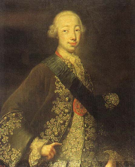 Georg Christoph Grooth. Portrait of Grand Duke Peter Fedorovich (Later Emperor Peter III). Государственный Русский музей Портрет великого князя Петра Федоровича Portrait of the Grand Duke Peter Fyodorovich 1740-е (?) Авторство под вопросом Холст, масло. 91 х 74 Слева внизу красной краской: 317. На обороте черным: 4886. На подрамнике: IV; синим карандашом: .. [смотри сканированный текст]; красным: 3490/ГРМ; поверх штамп: Г. Р. М. инв. № 3490 (номер зачеркнут) Пост.: 1927 из ГЭ* Ж-5342 Изображен с орденами святого Андрея Первозванного (лента) и святой Анны (крест). В Каталоге 1980 - Гроот Г.-К.; не датирован. Датируется по покрою костюма и характеру прически. Стилистическое и технологическое исследования позволяют сделать вывод о том, что этот портрет вряд ли может быть приписан кисти Г.-К. Гроота (Селиванов 1986**, с. 81.).